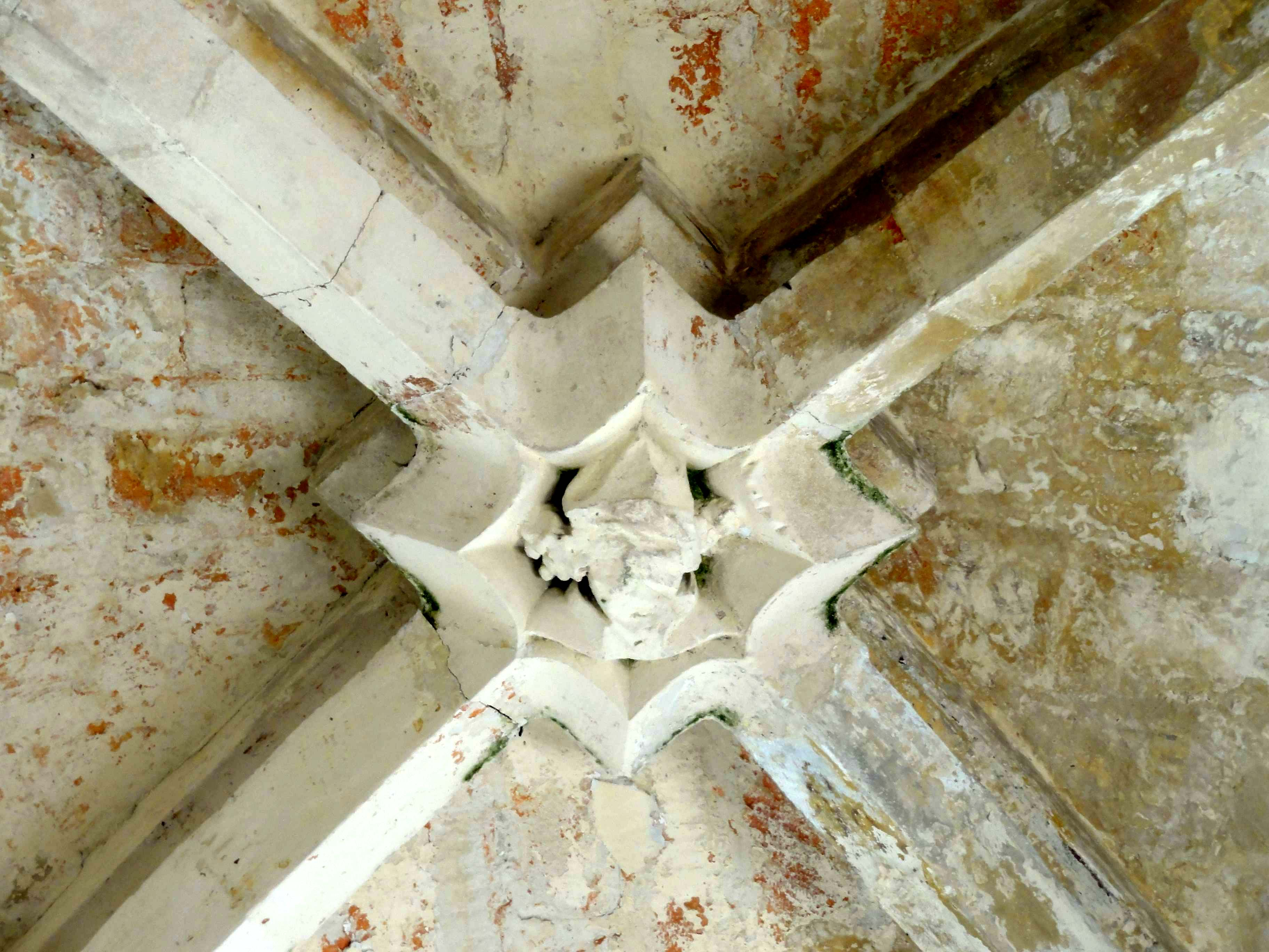 Clé de voûte - voir titre.